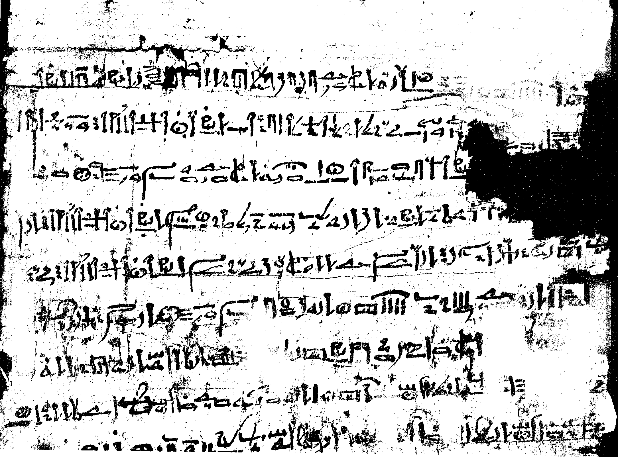 Foto eines Teils der ersten Seite des Papyrus Moskau 120, der die Geschichte des Wenamun enthält